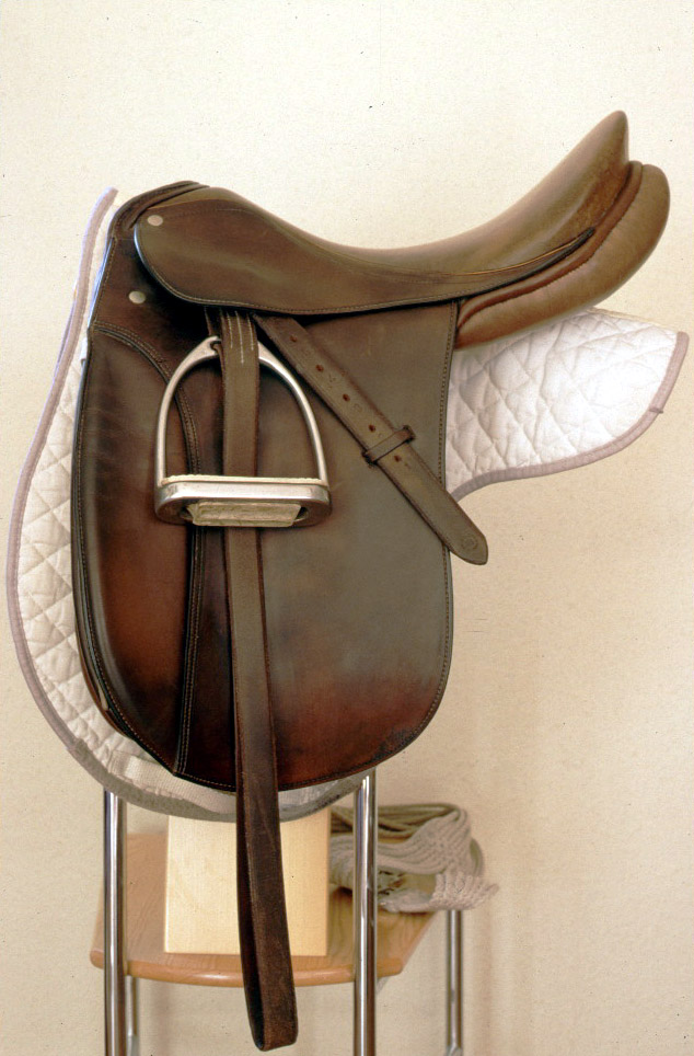 Englische Pritsche, Dressur